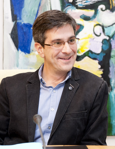 Mikel Arana reunido con el lehendakari Patxi López (27 de octubre de 2011) durante la ronda de contactos con los partidos políticos posterior al cese de actividades de ETA